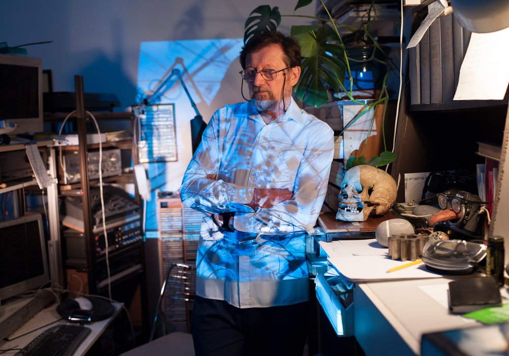 Urbán Ádám PéldaKÉPek című sorozatából: Dozvald János